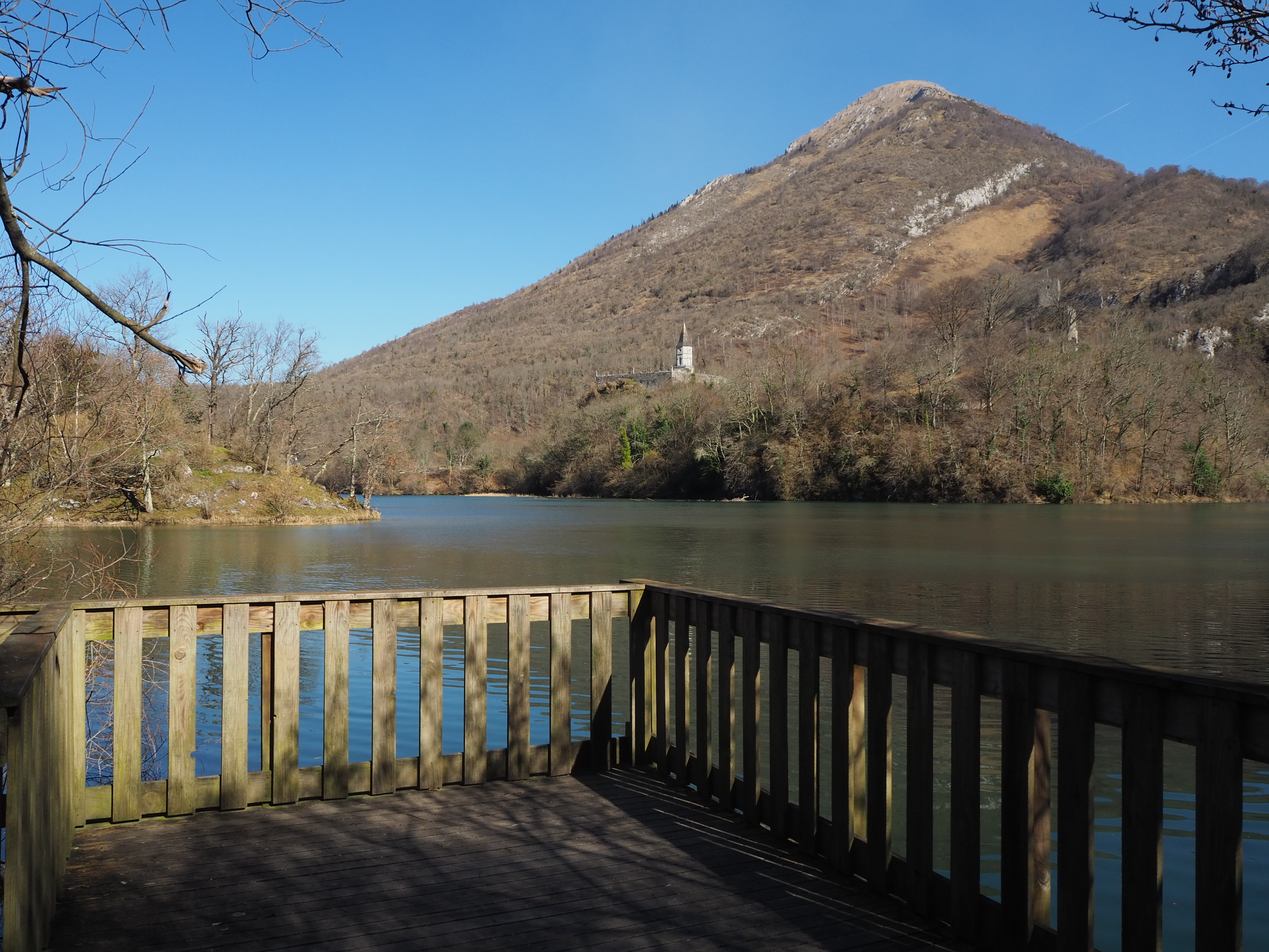 Vue sur Castet depuis son lac.